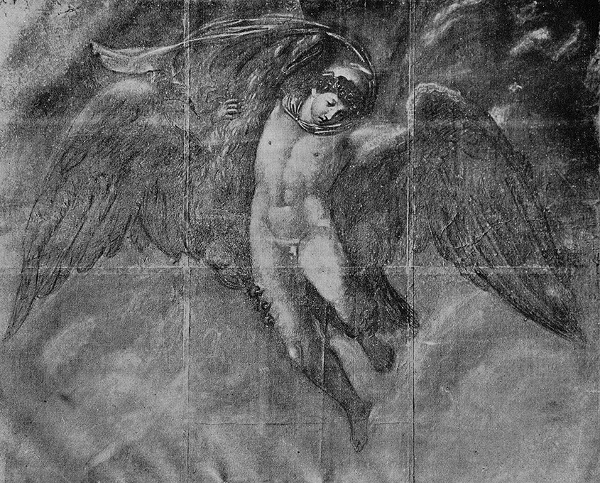 Asmus Jakob Carstens, Ganymed, vom Adler getragen, 1793, schwarze Kreide, weiß gehöht auf graubraunem Karton, 94 x 116 cm, Weimar, Kunstsammlungen zu Weimar.